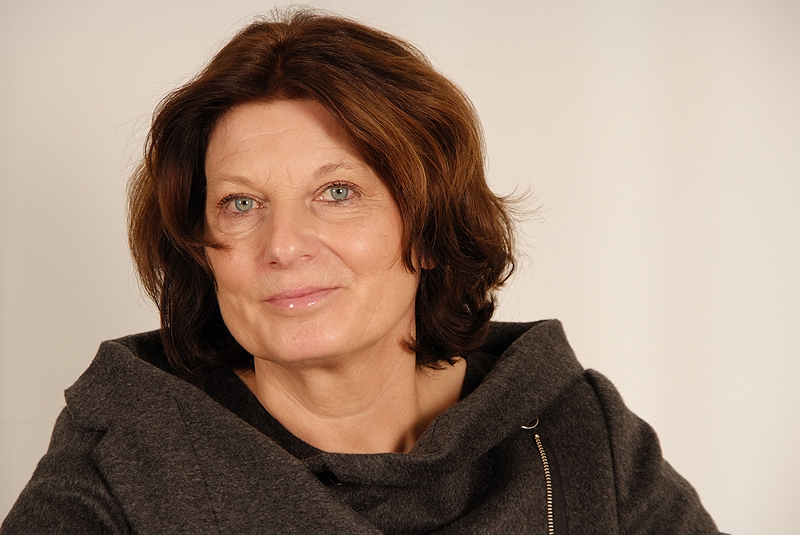 Gisela Konrath, Landtagsabgeordnete Niedersachsen, 16. Wahlperiode (Fotoprojekt Landtagsabgeordnete Niedersachsen am 24. und 25. November 2009)